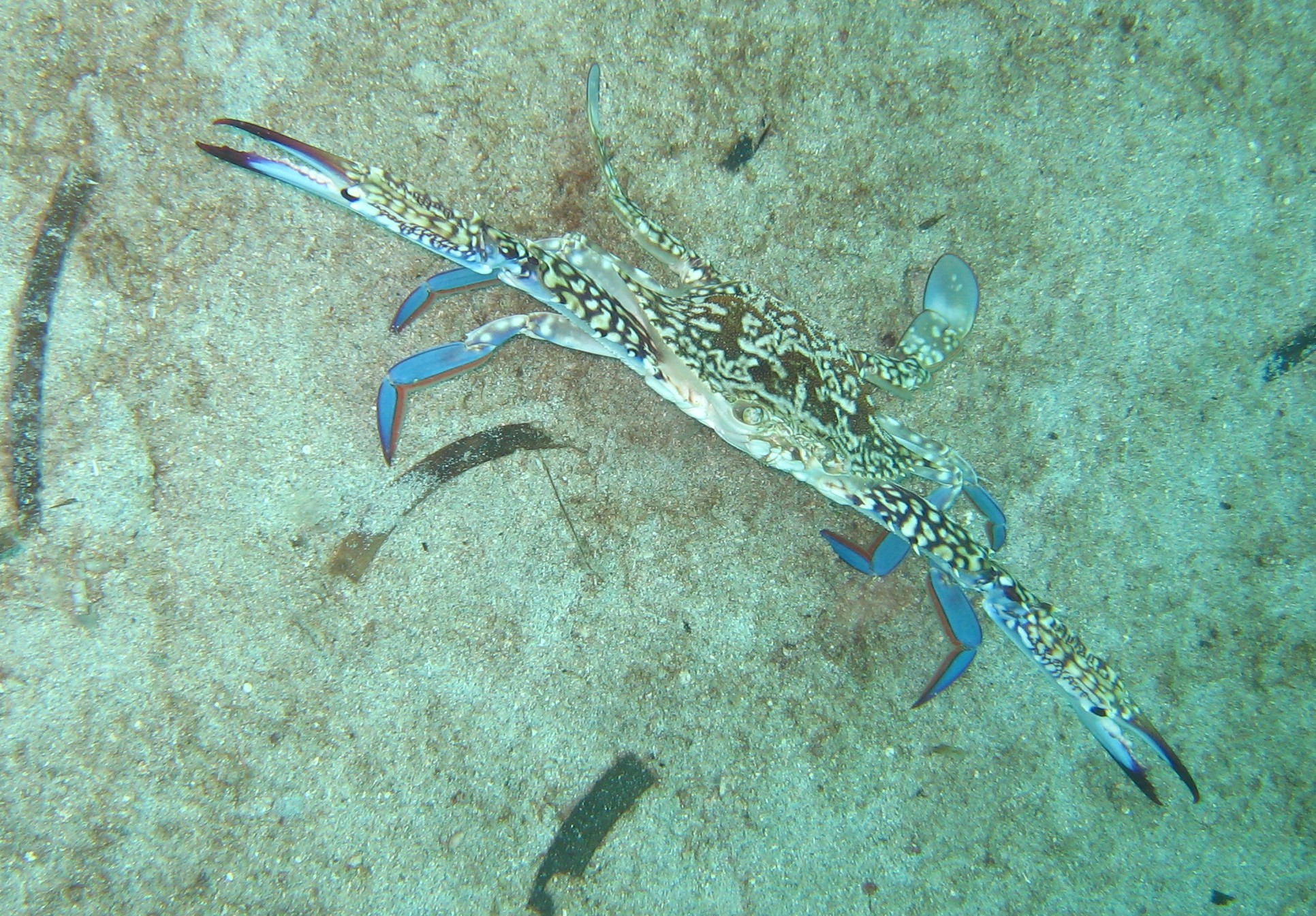 Mactan Cebu, Philippines